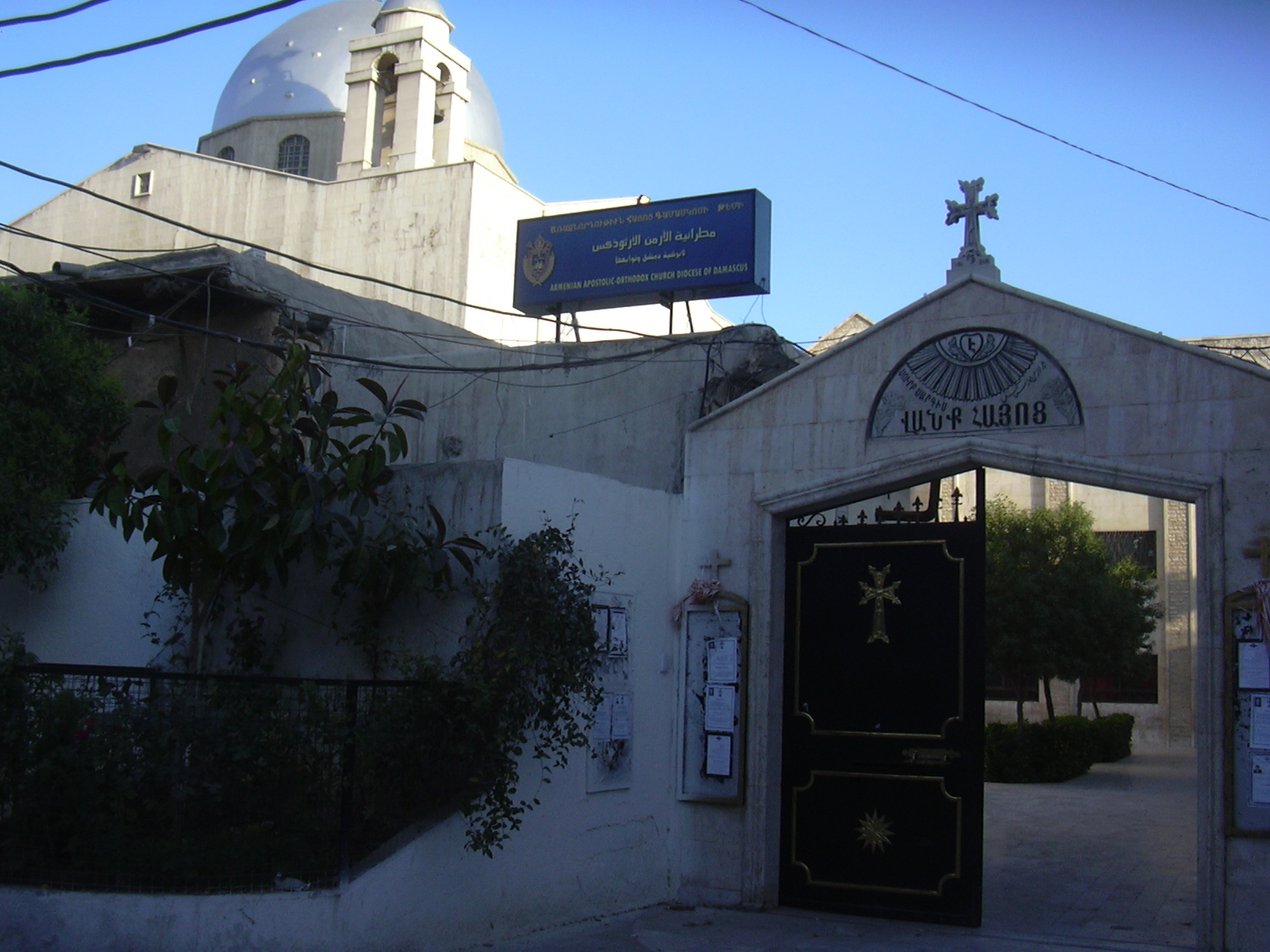 Damaskus, Mar Sarkis, die armenisch orthodoxe Kirche